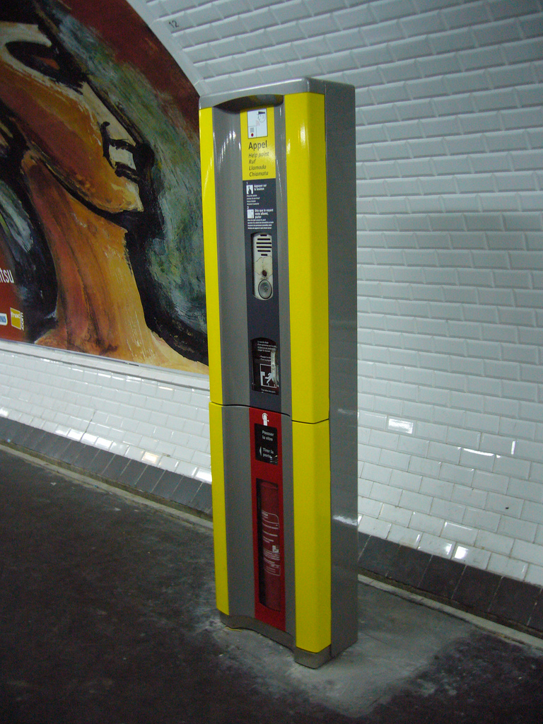 Signal d'alarme sur le quai de la station Reuilly Diderot, sur la ligne 1 du métro de Paris.